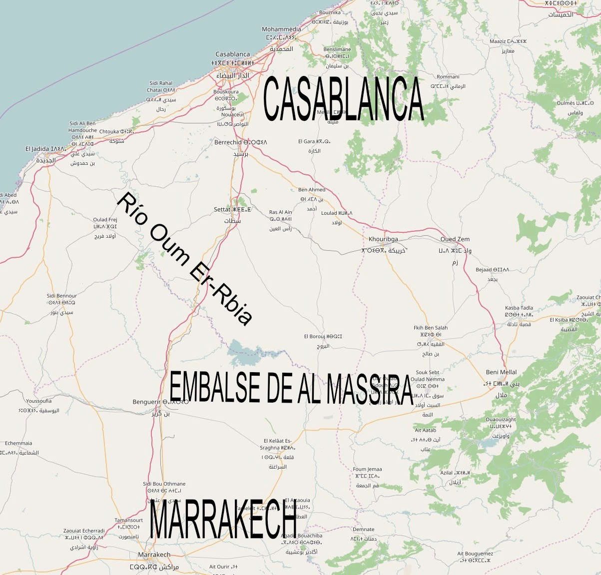 Embalse de Al Massira, Marruecos